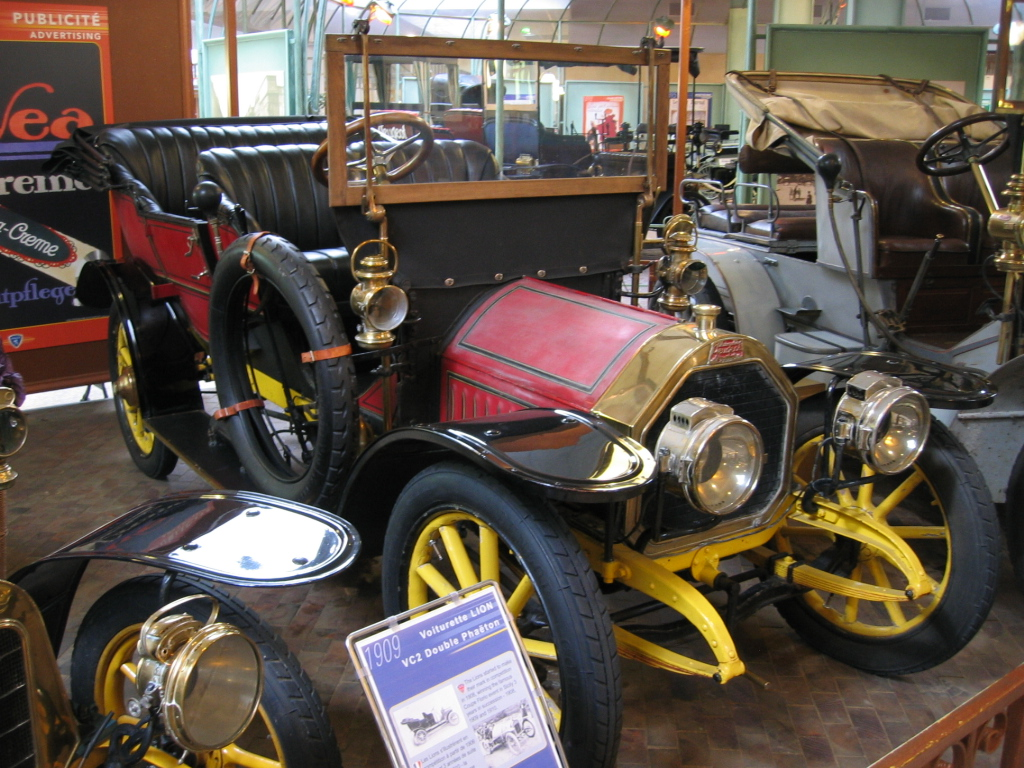 Peugeot Type 116 - Musée Peugeot Sochaux